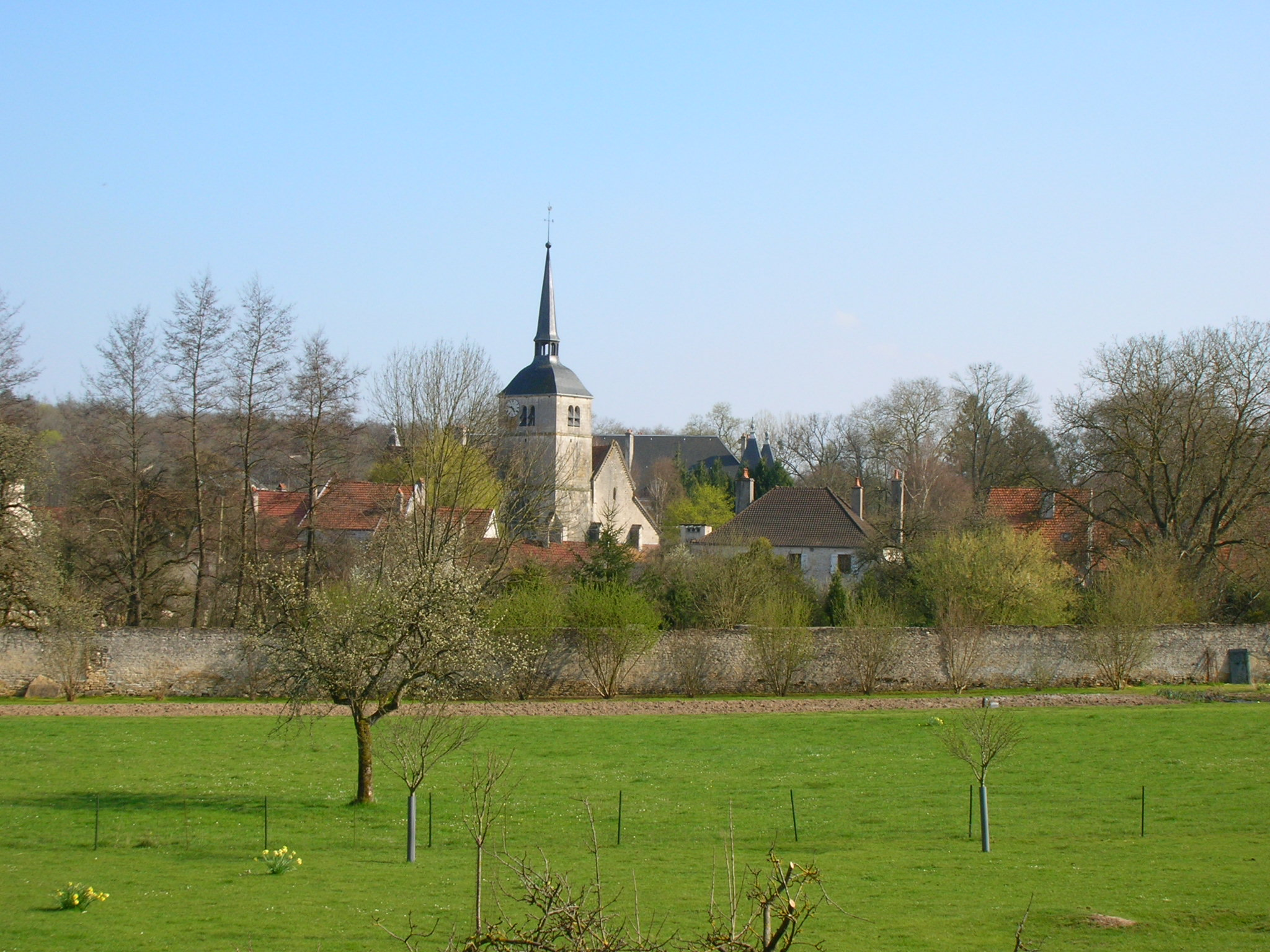 Arc-en-Barrois